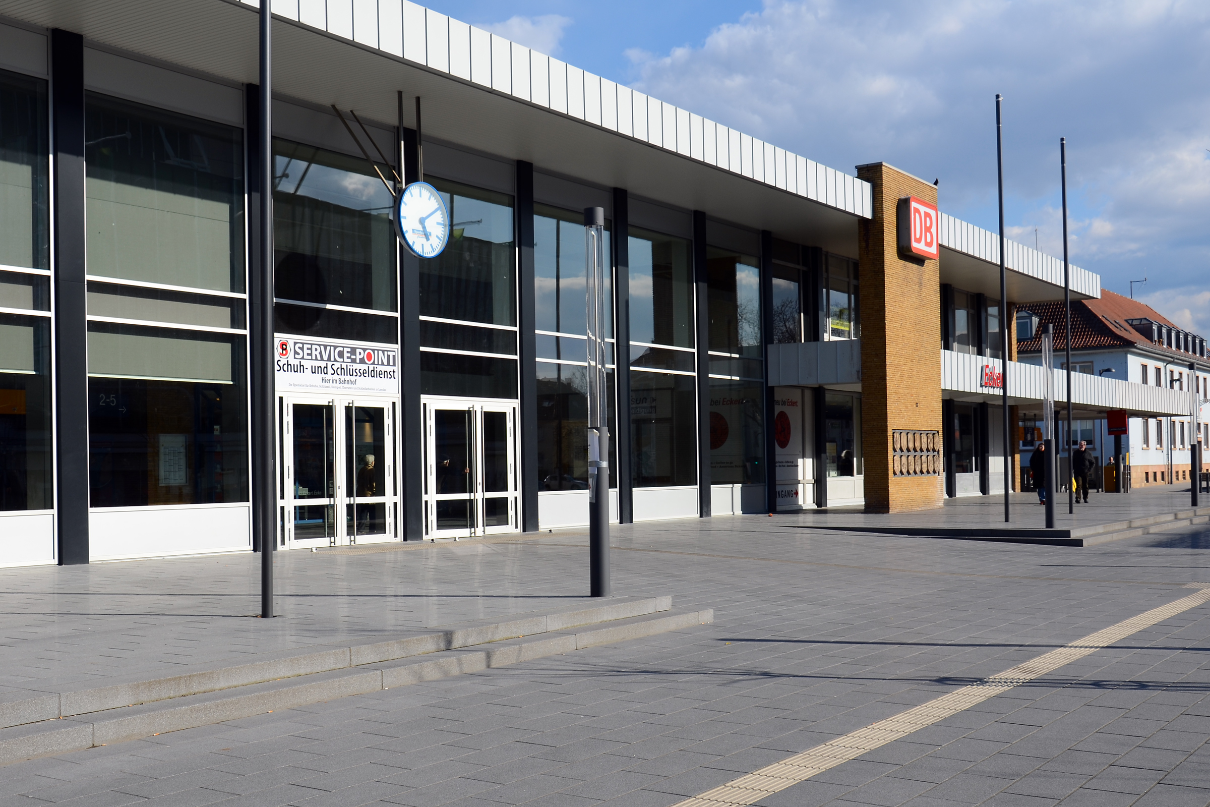 Landau in der Pfalz, Hauptbahnhof